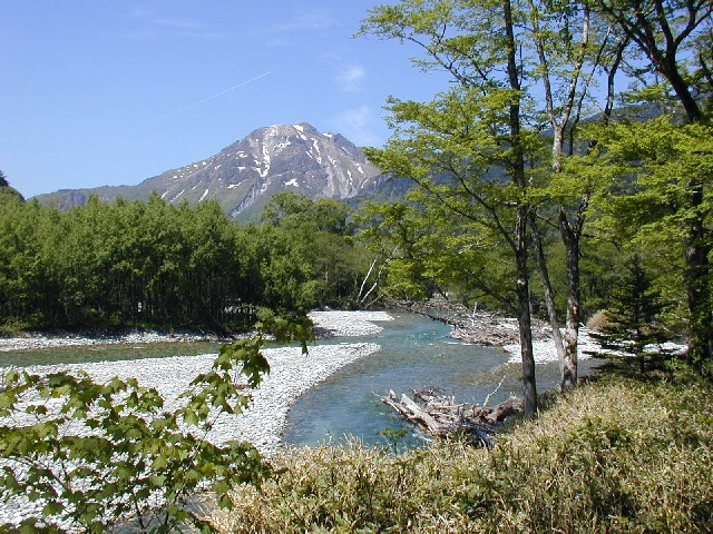 Yakedake volcano.